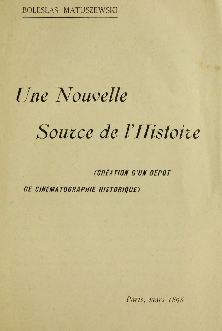 Une nouvelle source de l'histoire. (Creation d'un dépot de cinematographie historique) 1898.